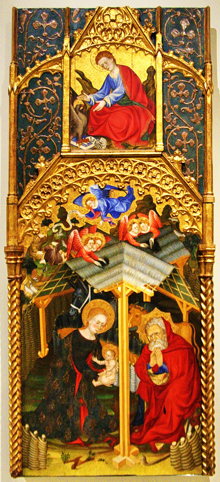 Nativitat i Sant Joan Evangelista- Gerau Gener i Lluís Borrassà-MNAC